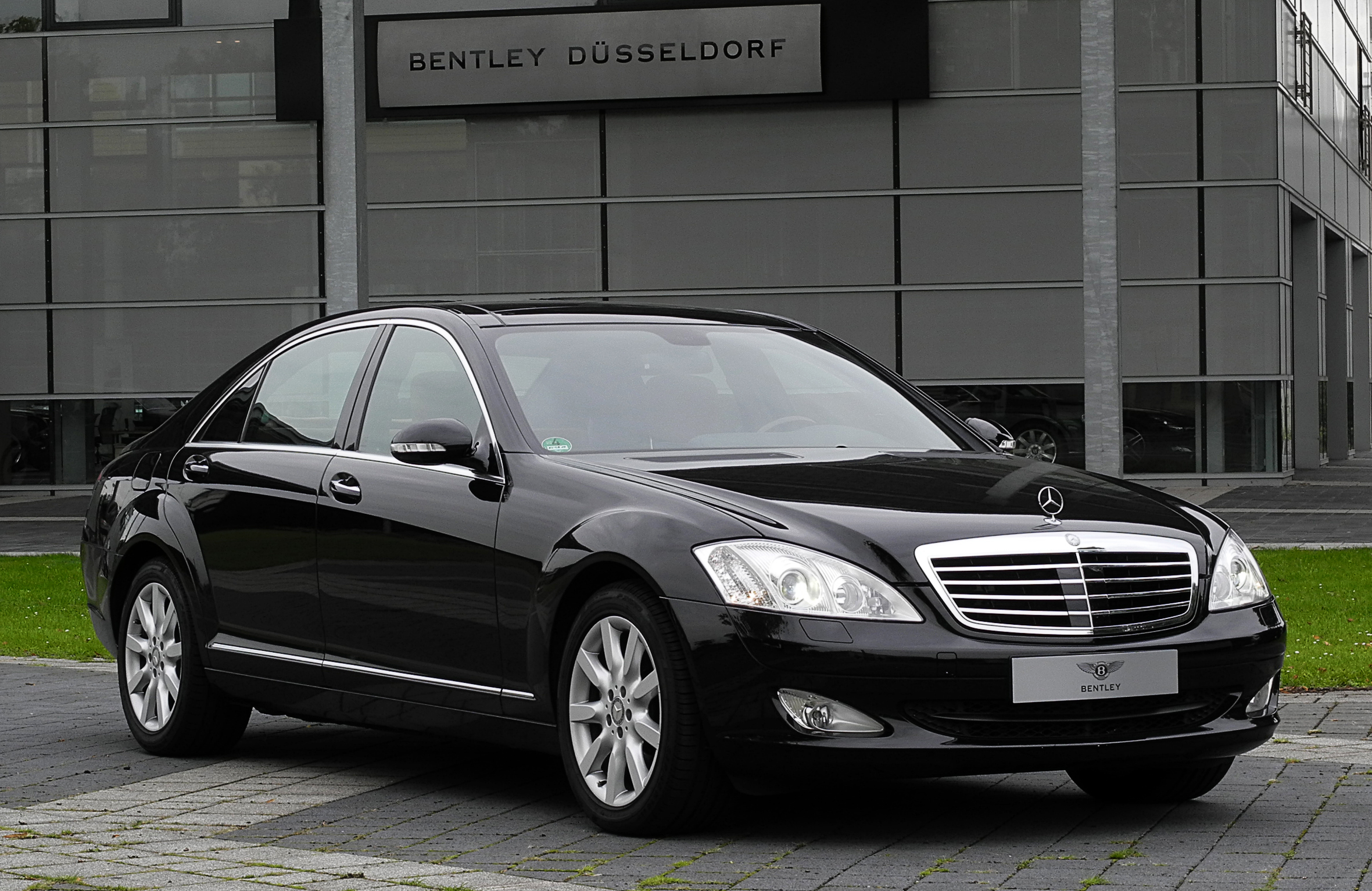 Mercedes-Benz S 320 CDI 4MATIC L (V 221)